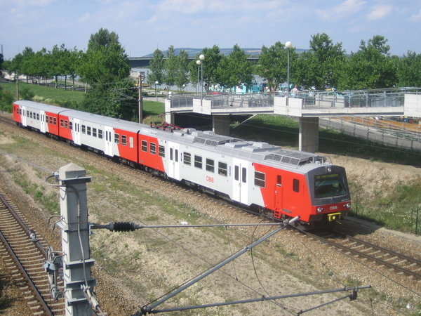 de: Ein Zug der Linie S45 (Wien) beim Handelskai